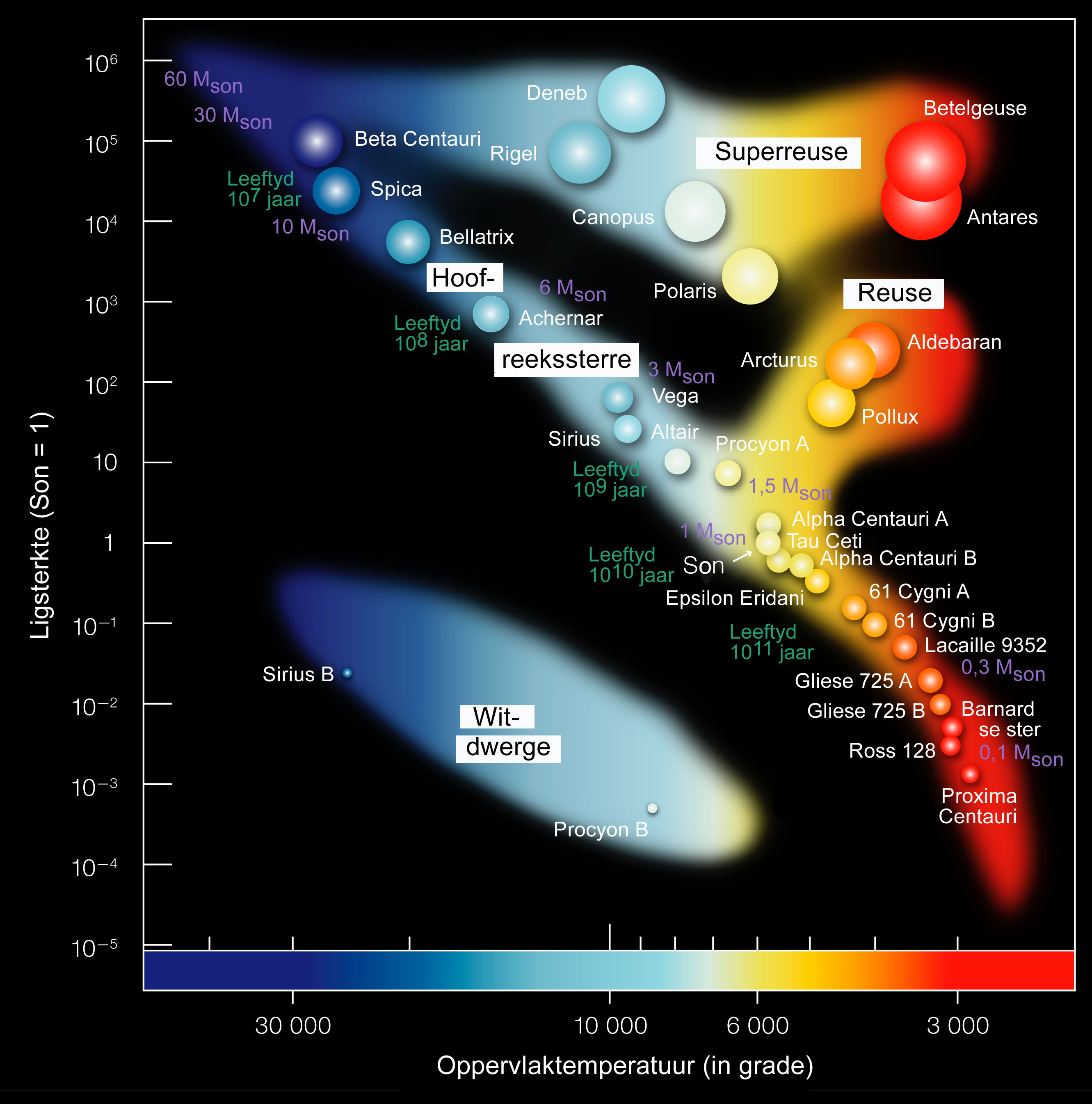 Sterre op die HR-diagram.